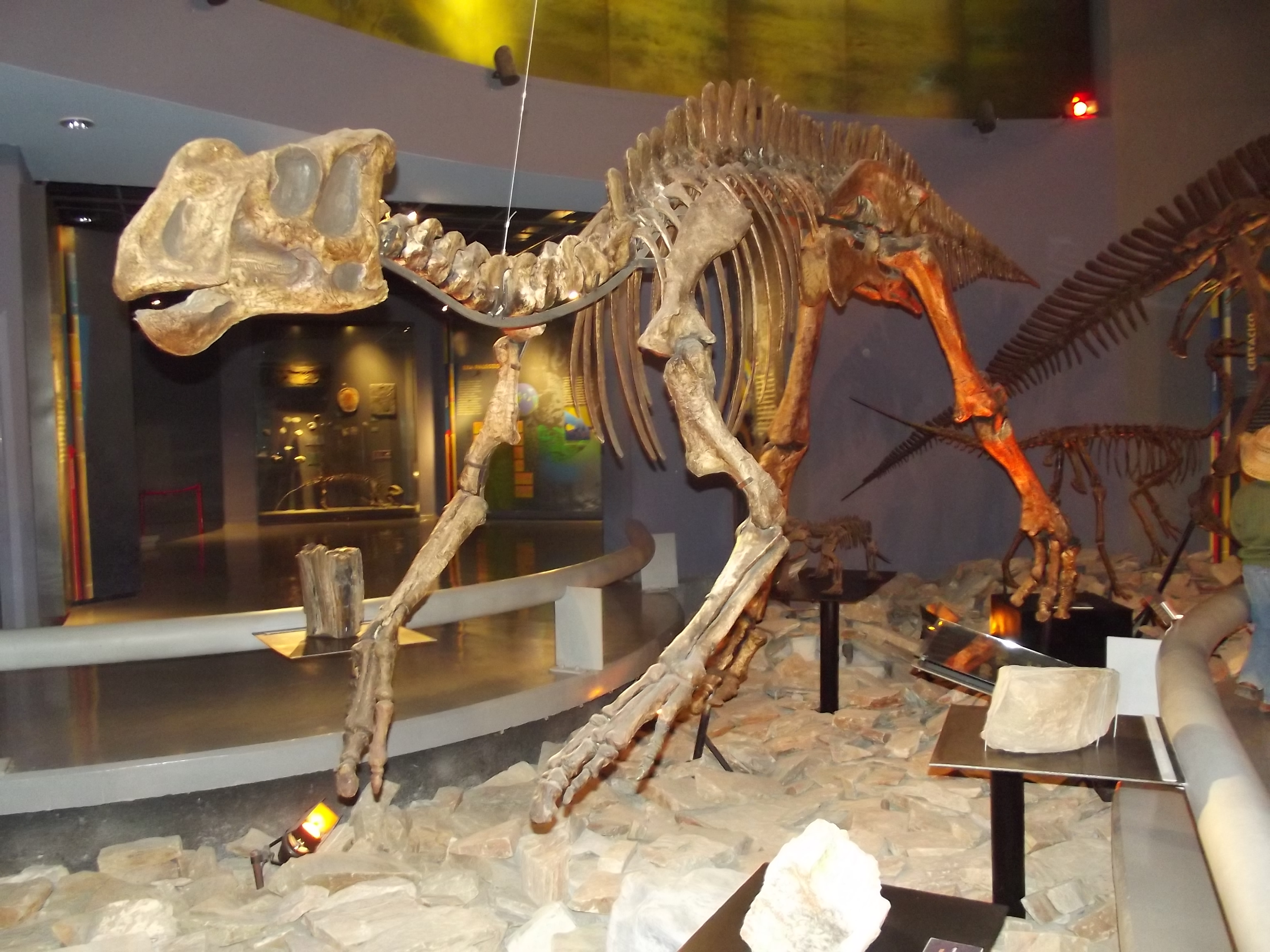 Museo del Desierto de Saltillo